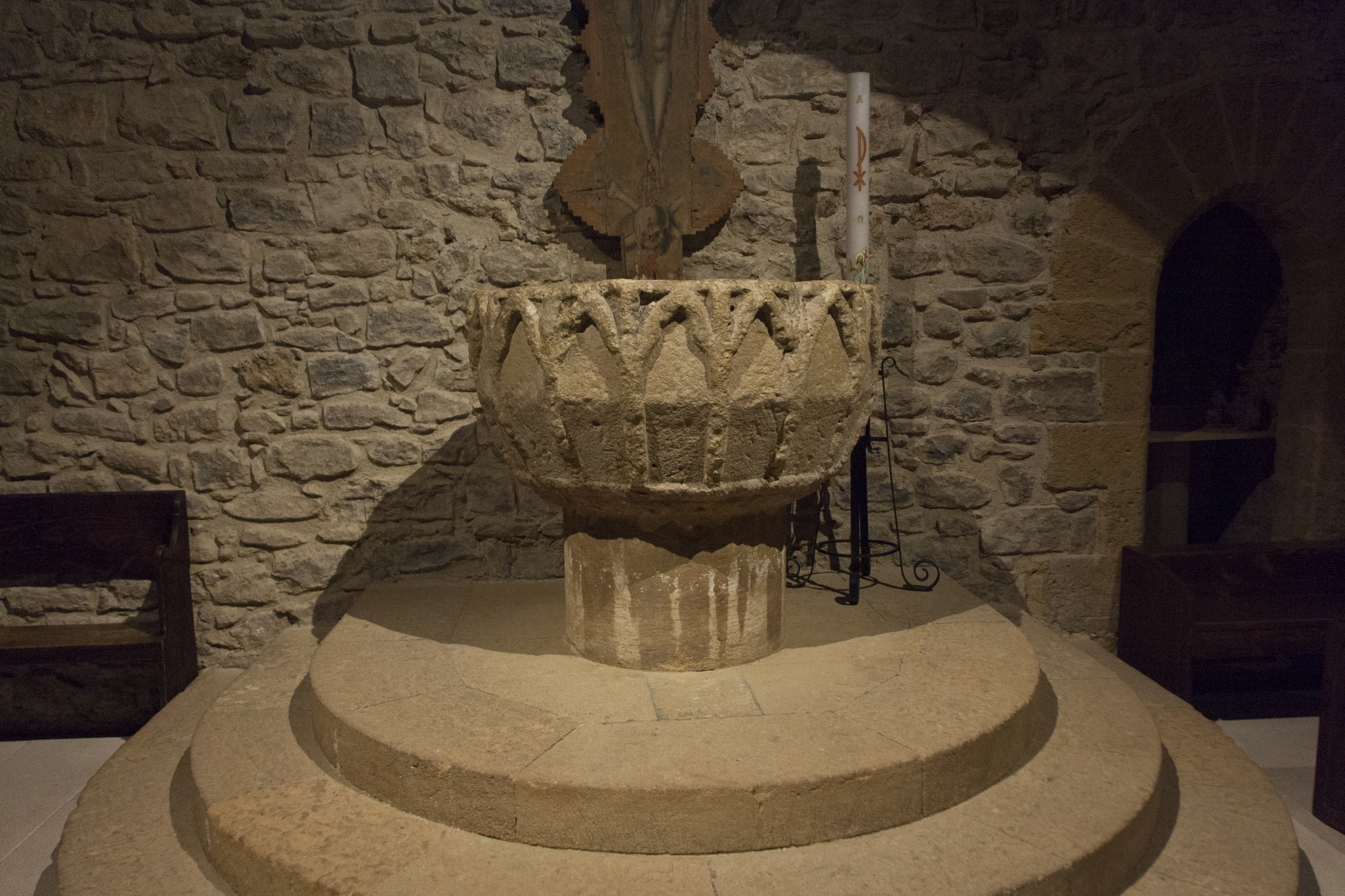 Interni abbazia di Santo Spirito